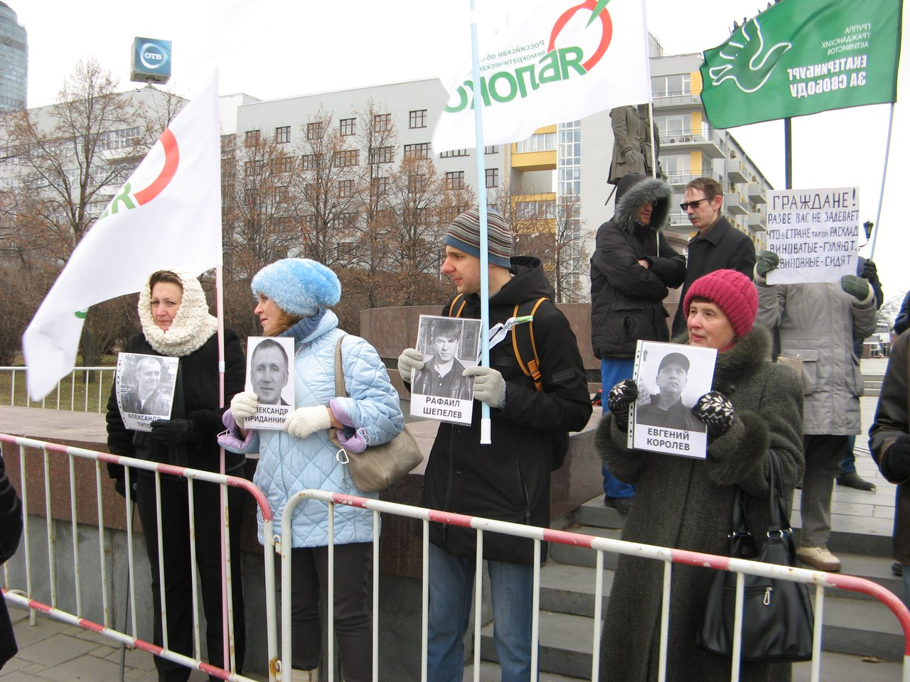 Плакаты с портретами задержанных в Москве членов Артподготовки из Екатеринбурга на пикете в защиту политзаключенных